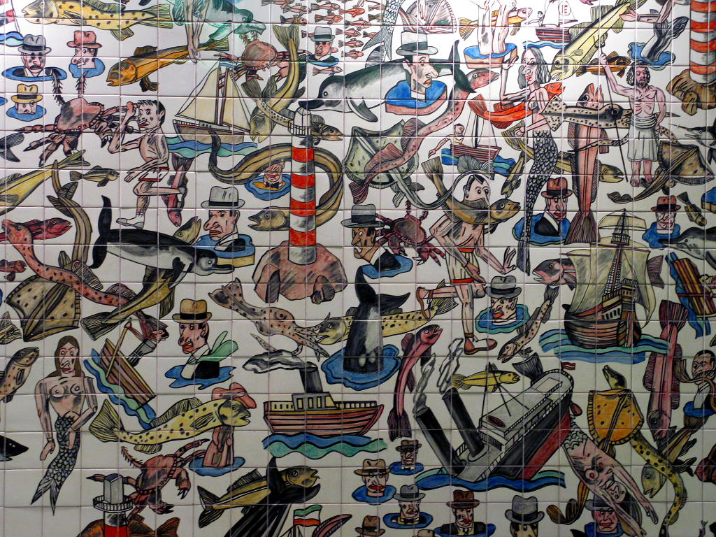 Mural de Antonio Seguí en el Metro Oriente, Lisboa.